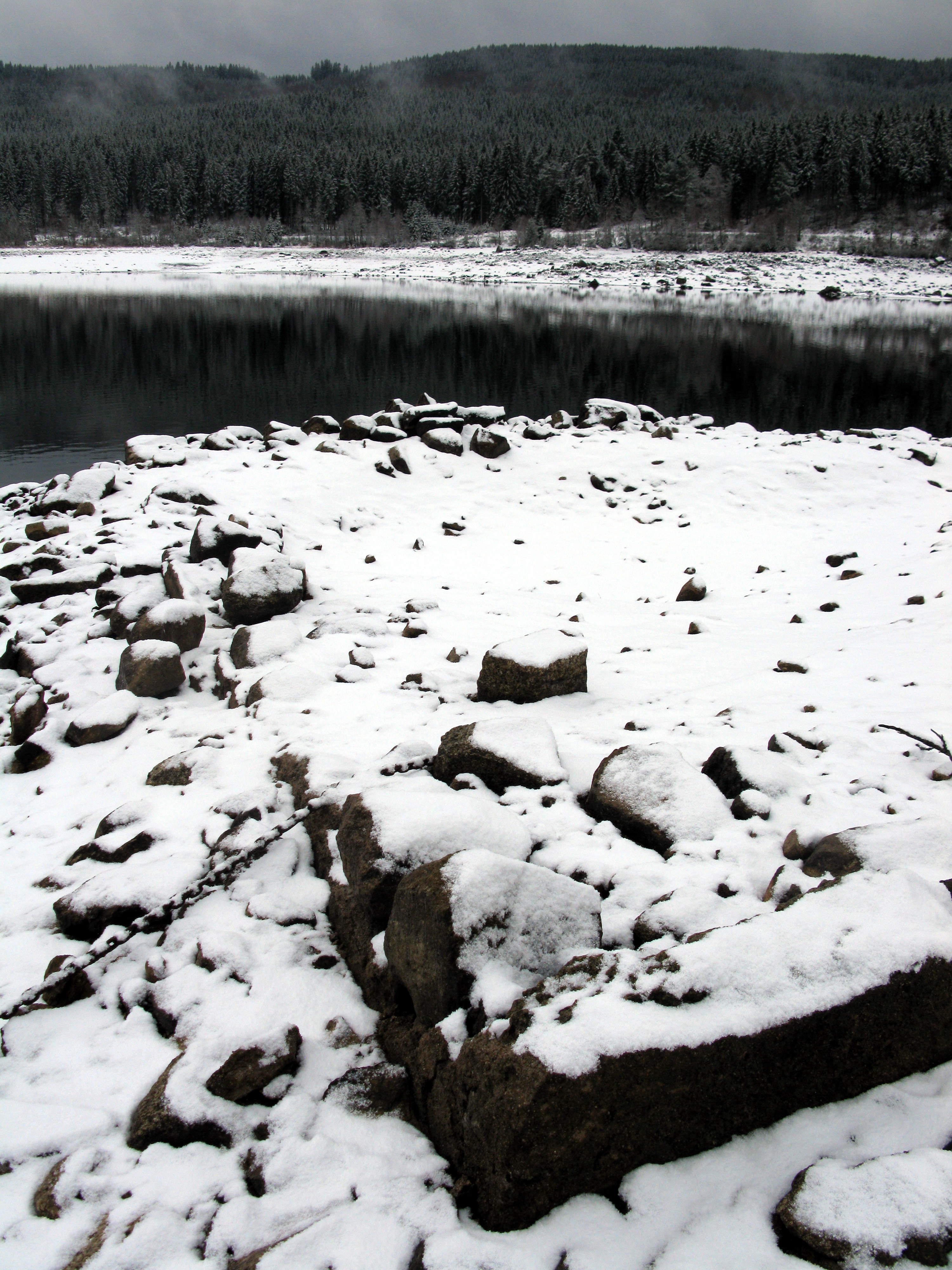 Niedrigwasser am Schluchsee mit Fundamenten der alten Schule von Aha.